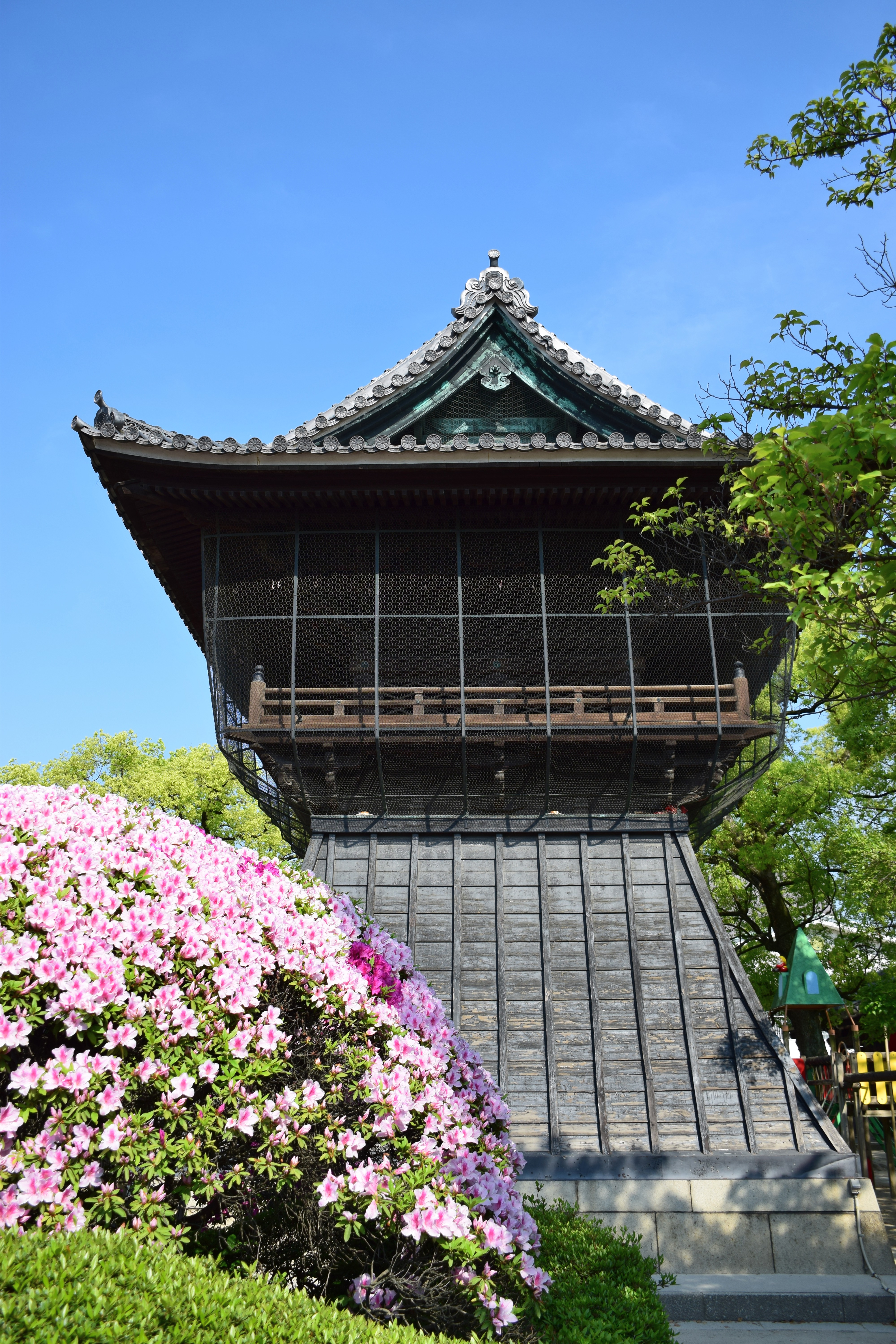 建中寺鐘楼